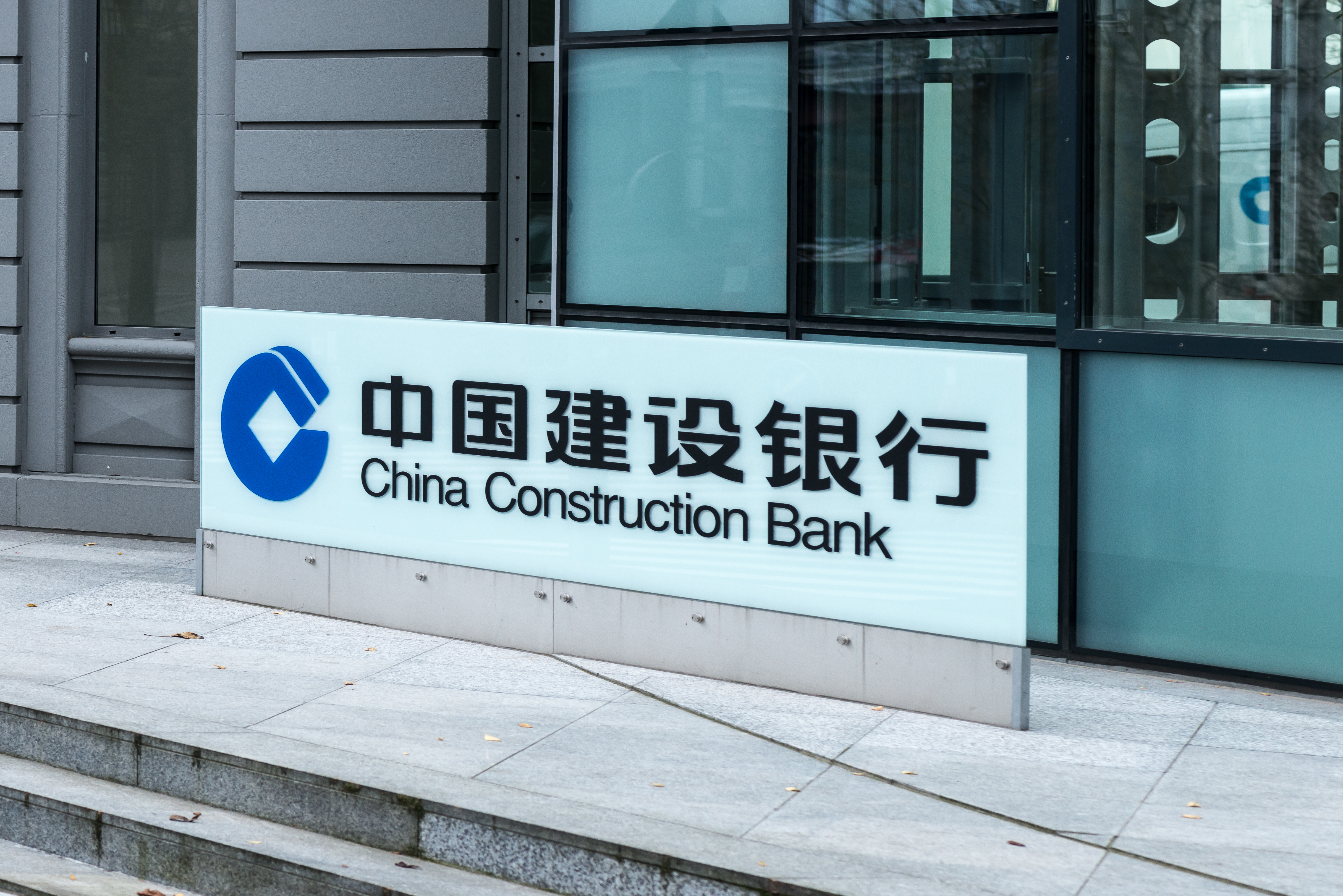 Den "Haaptquartier" fir Europa vun der China Construction Bank ass um 1, Boulevard Royal an der Uewerstad.